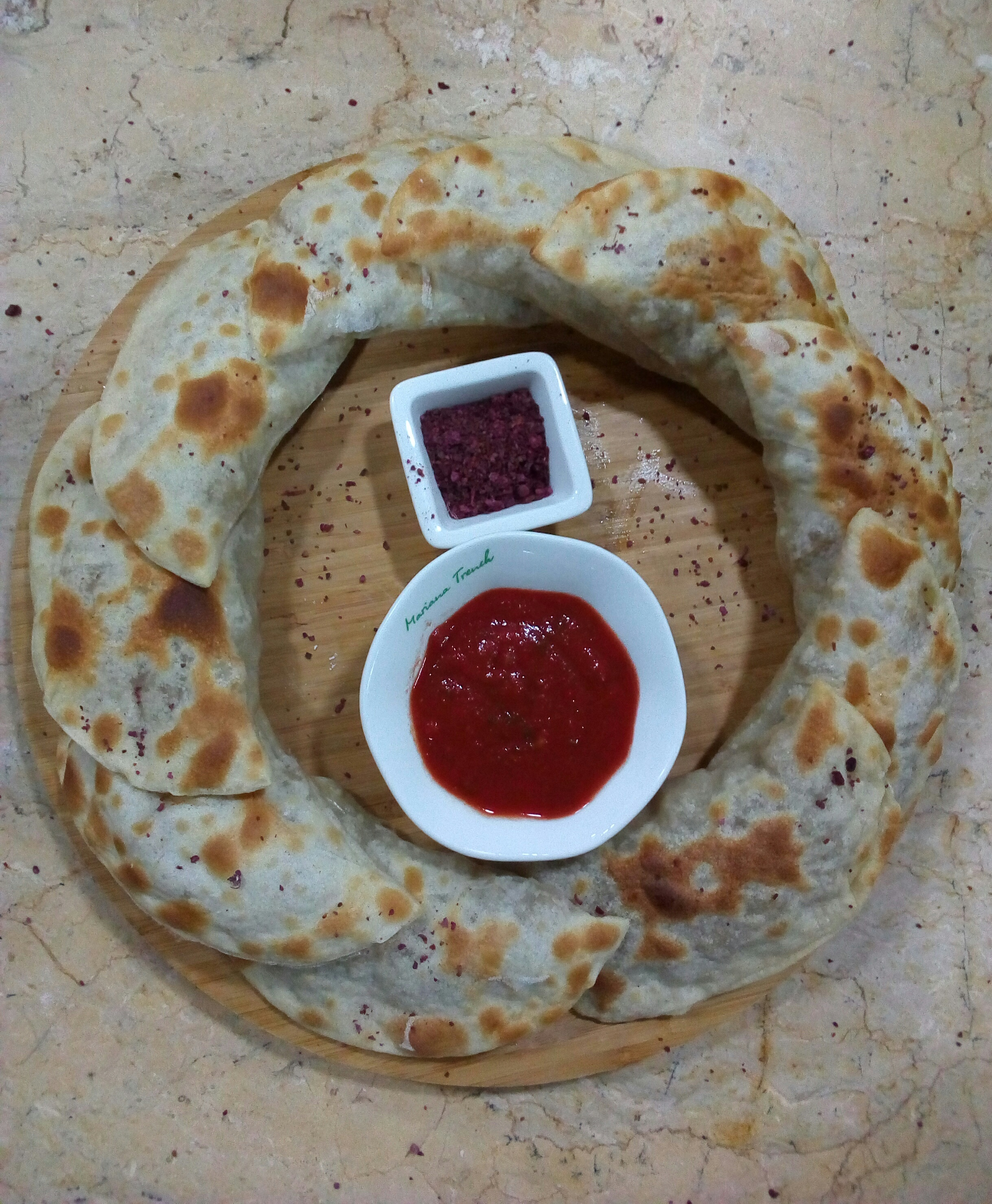 Corat qutabı